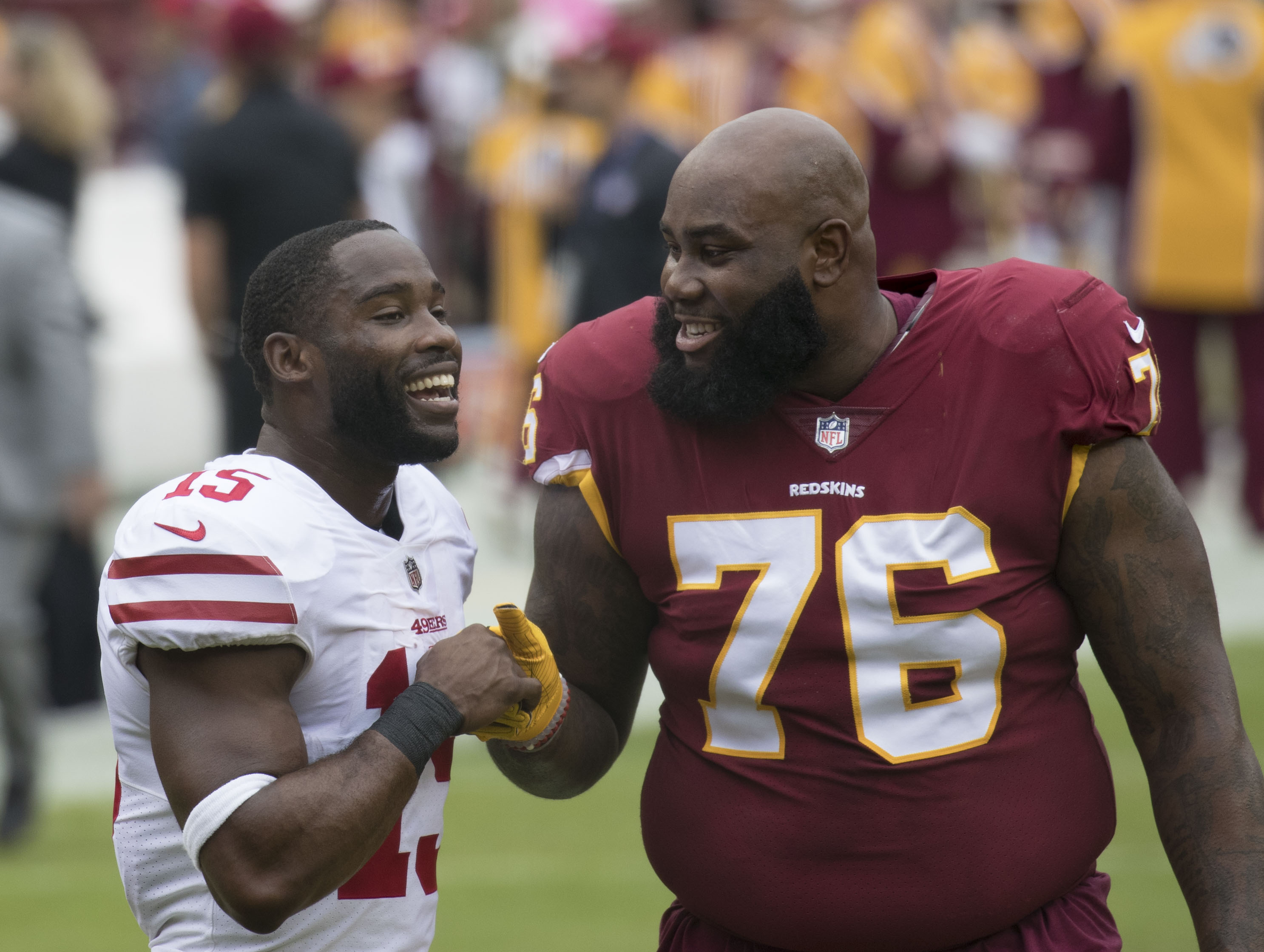 49ers at Redskins 10/15/17